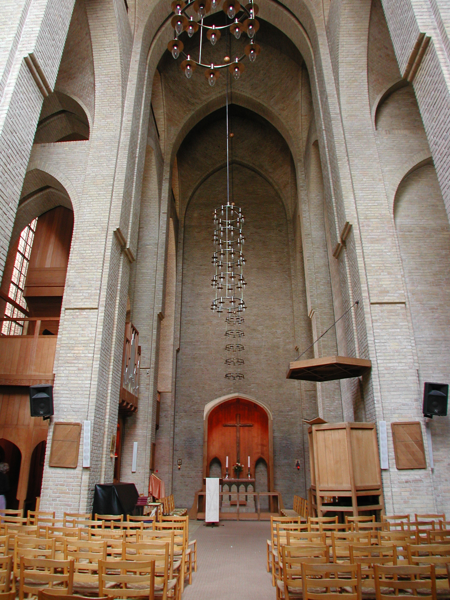 Bethlehemskirken, Copenhagen, Denmark. Interior.